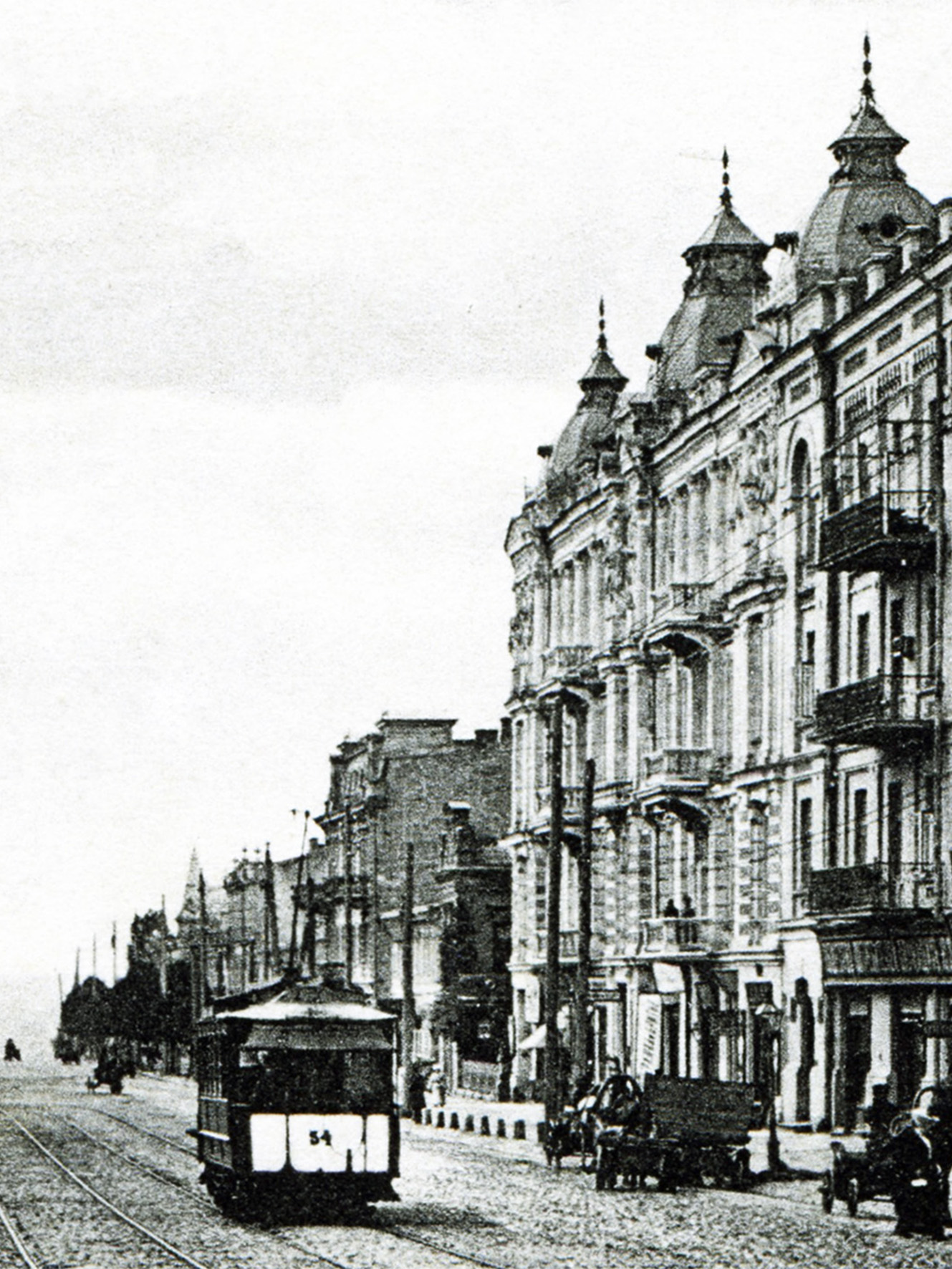 Садиба Шампаньєра, Київ, вул. Богдана Хмельницького, 44